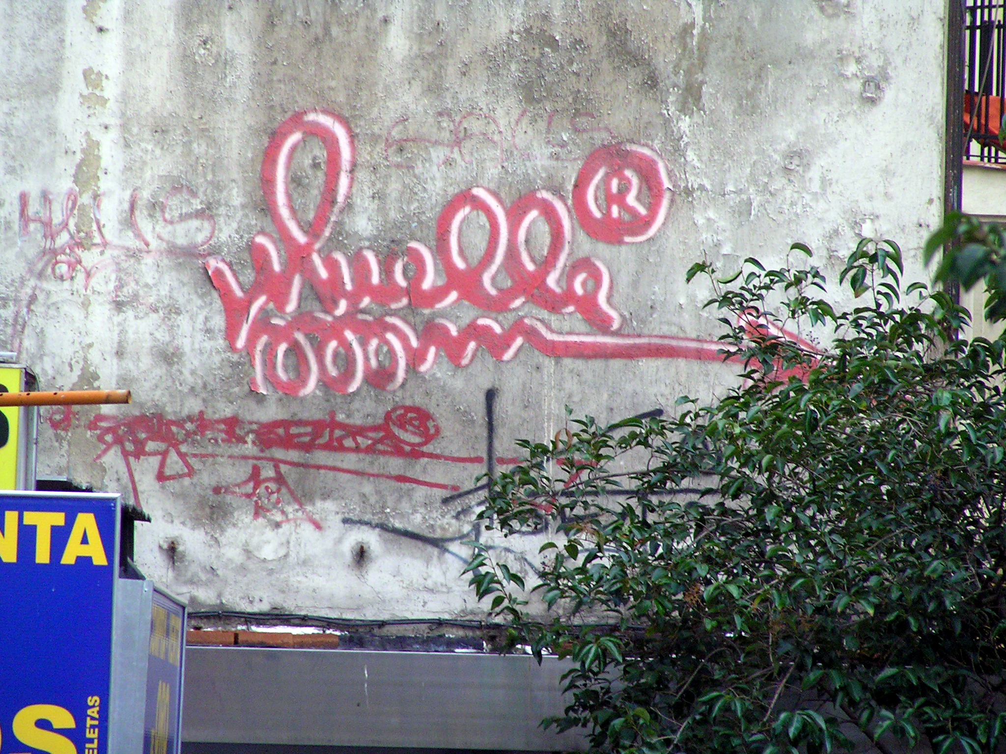 Firma de Muelle en la calle Montera de Madrid junto a otra de Akracia 4cd y Halls